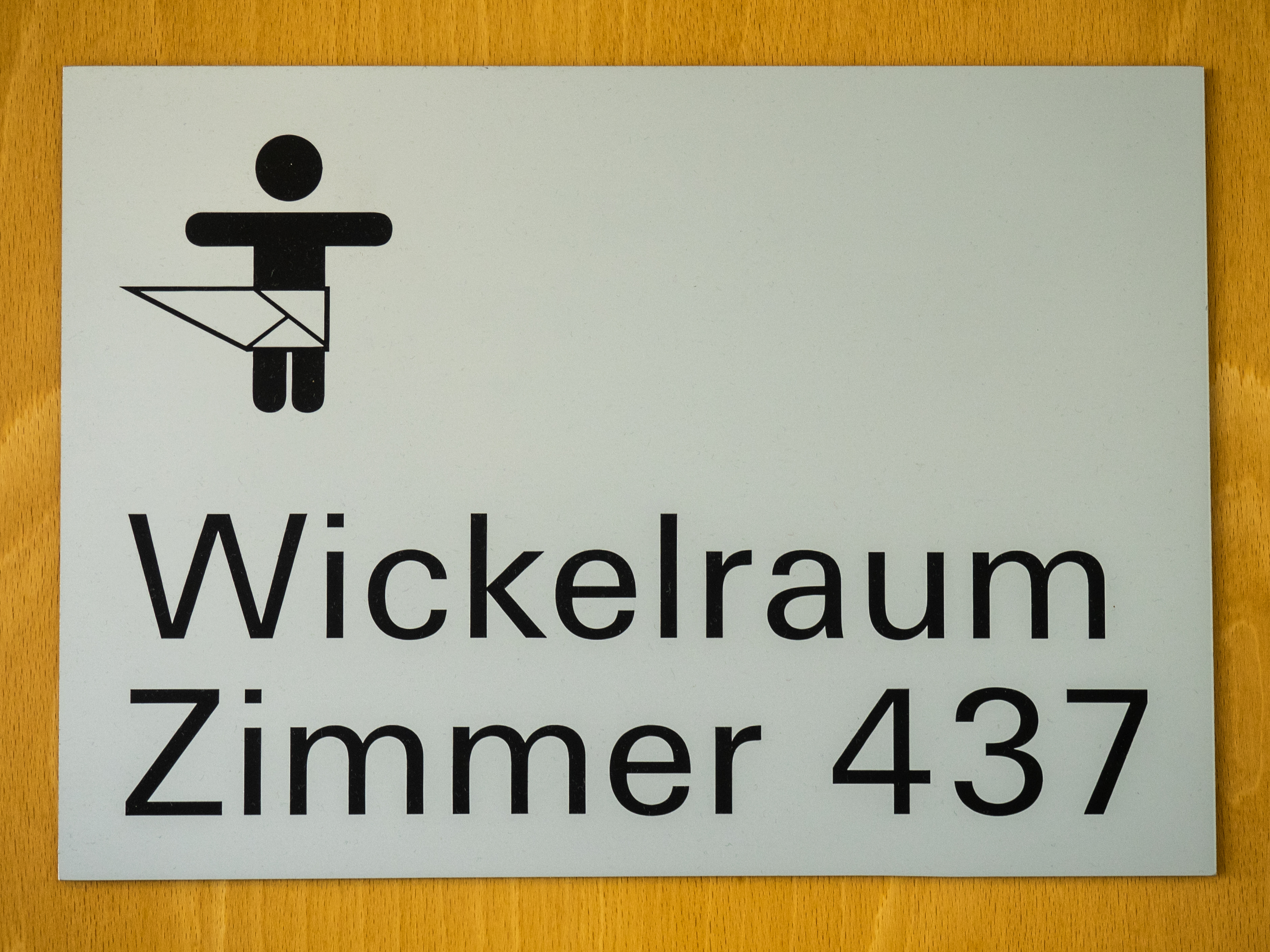 Wickelraumschild in einer Behörde